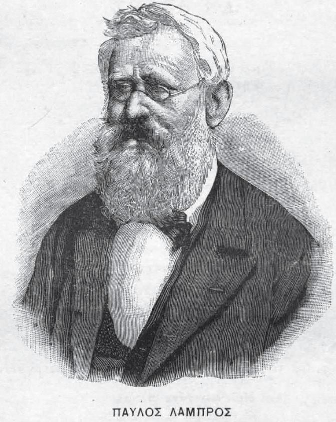 namhafte Griechische Persönlichkeit, 19. Jahrhundert